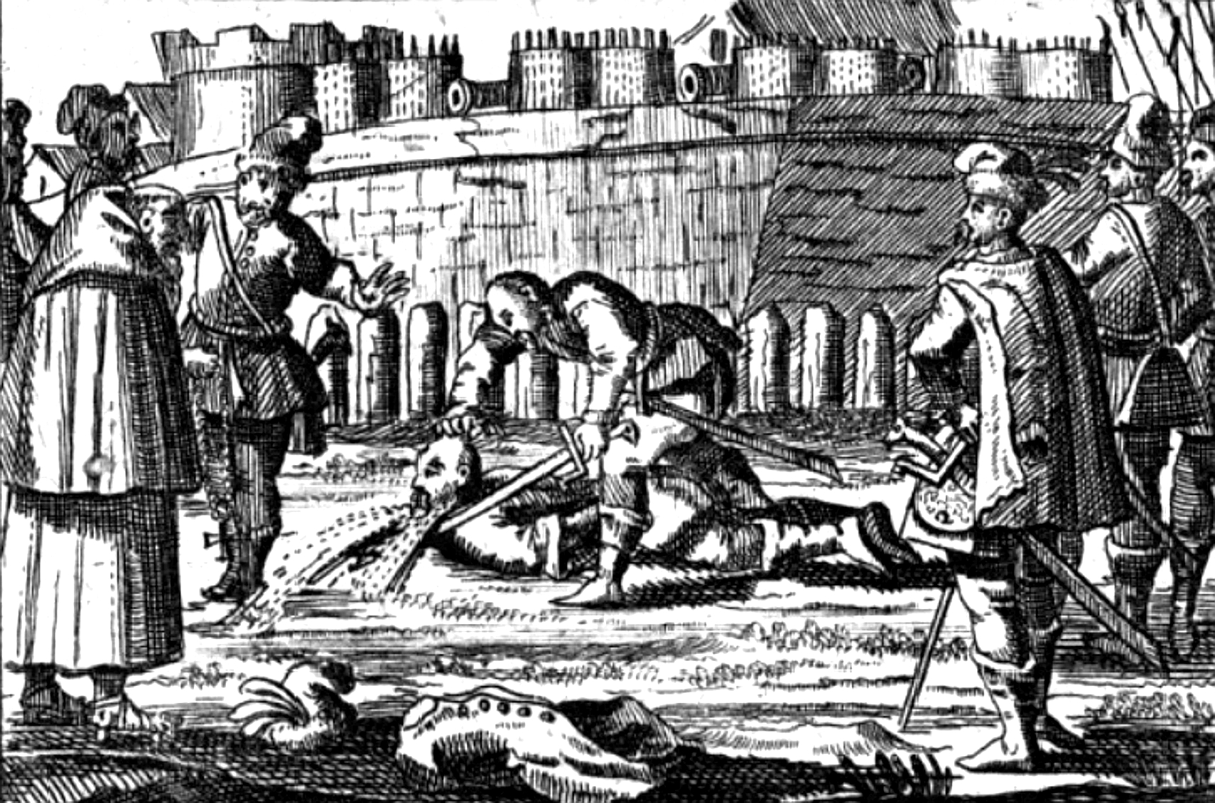 Ocskay László lefejeztetése «Oczkay wird von den Rebellen enthauptet.»